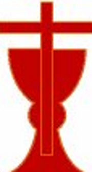 Husitská církev má ve znaku kalich s křížem